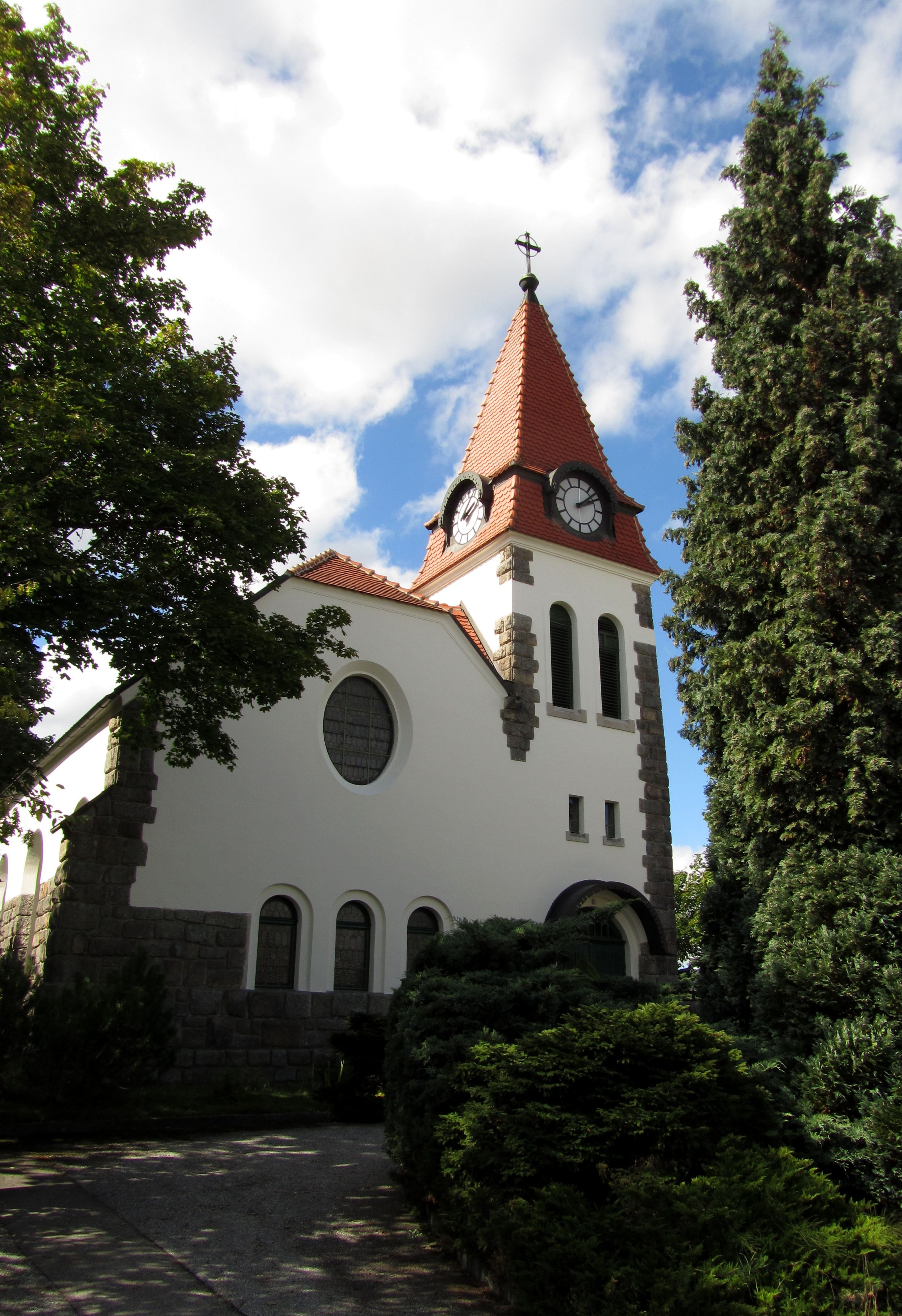 Evang. Pfarrkirche A.B./Friedenskirche und Pfarrhaus